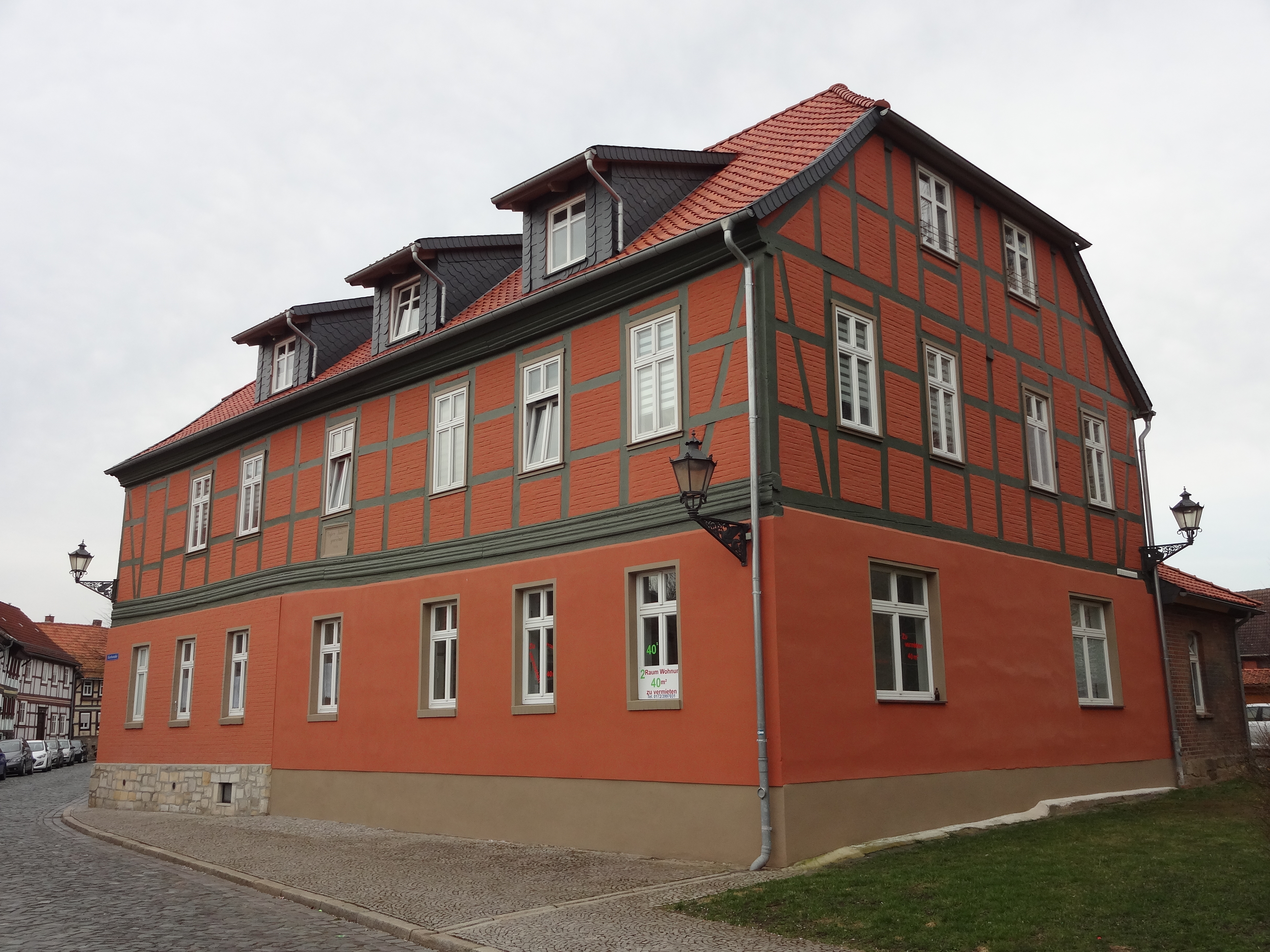 Kulturdenkmal in Derenburg